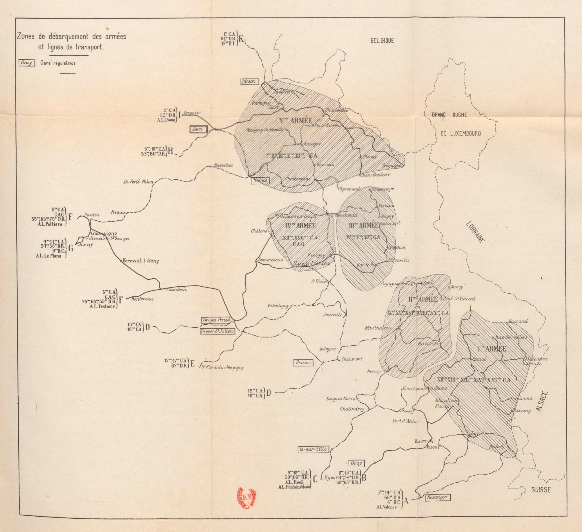 Carte des zones de débarquement des armées françaises prévues par le plan XVII, appliqué au début du mois d'août 1914, et lignes de transport.